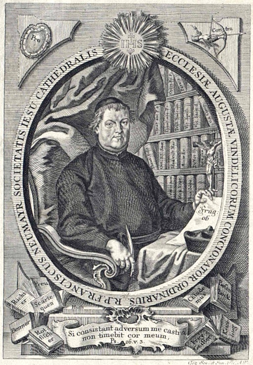 Franz Neumayr (1697-1765), Jesuit, Augsburg